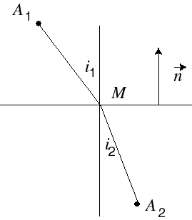 loi de descartes auteur r ferreol